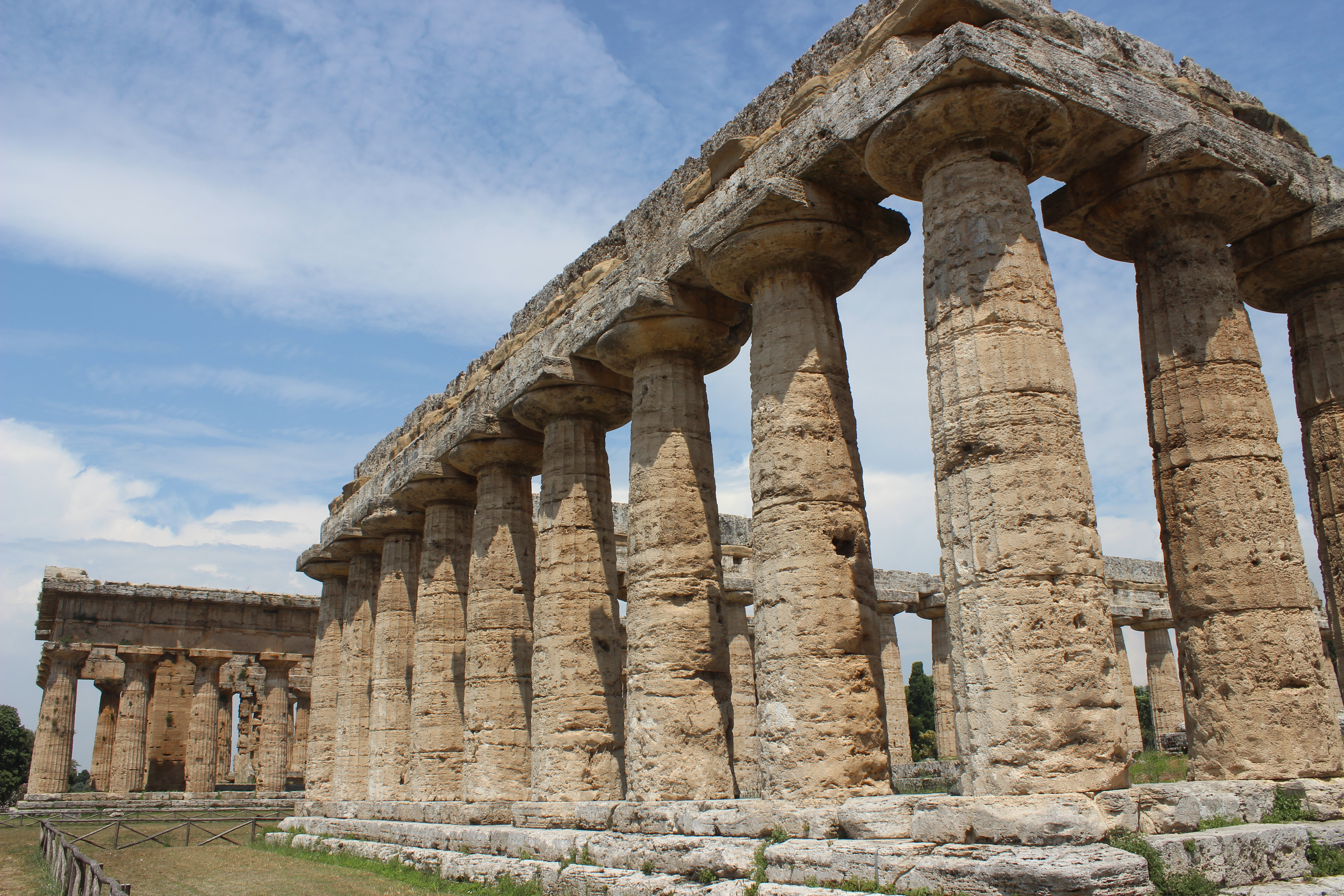 Paestum, templos griegos.